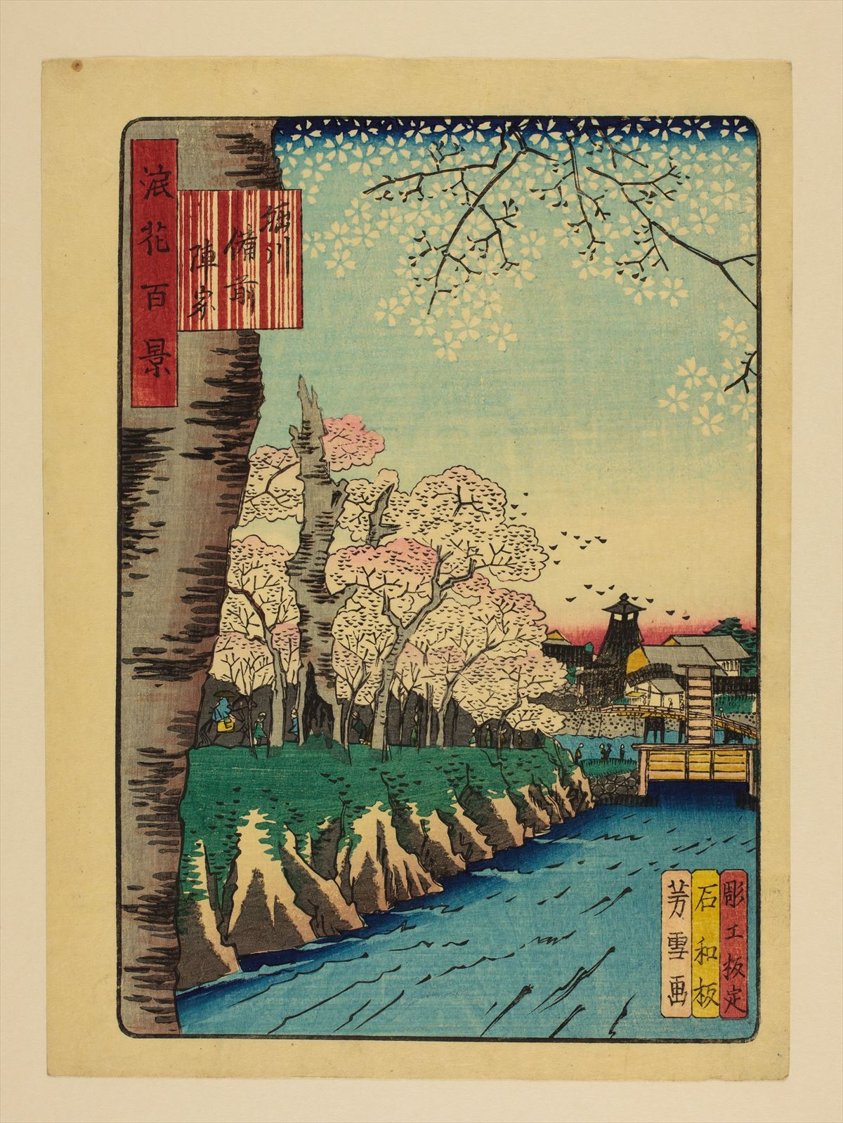 1800年代。南粋亭芳雪/画。浪花百景 102枚のうちの1枚。大阪市立中央図書館蔵。